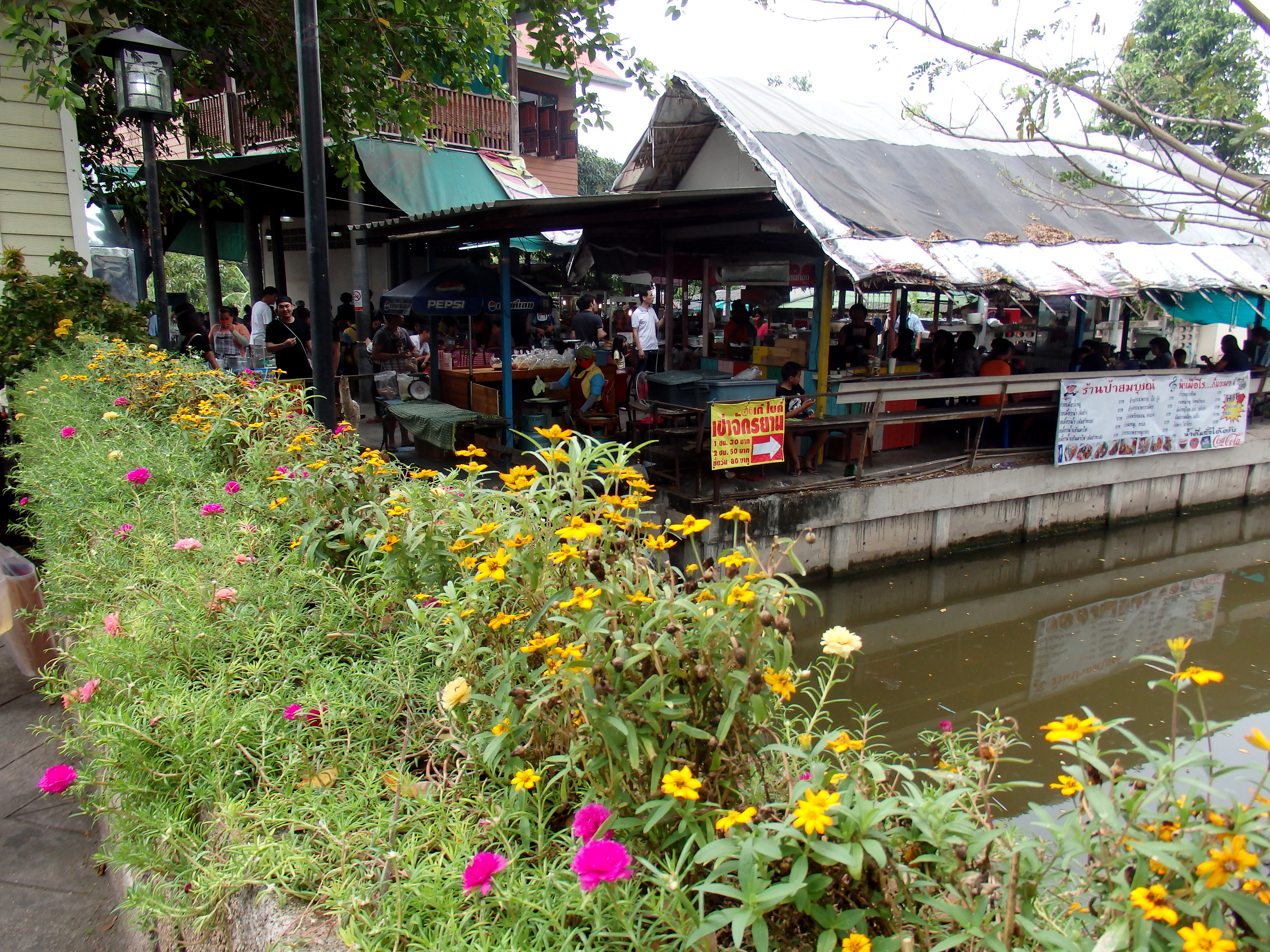 Bang Nam Phueng, Phra Pradaeng District, Samut Prakan, Thailand